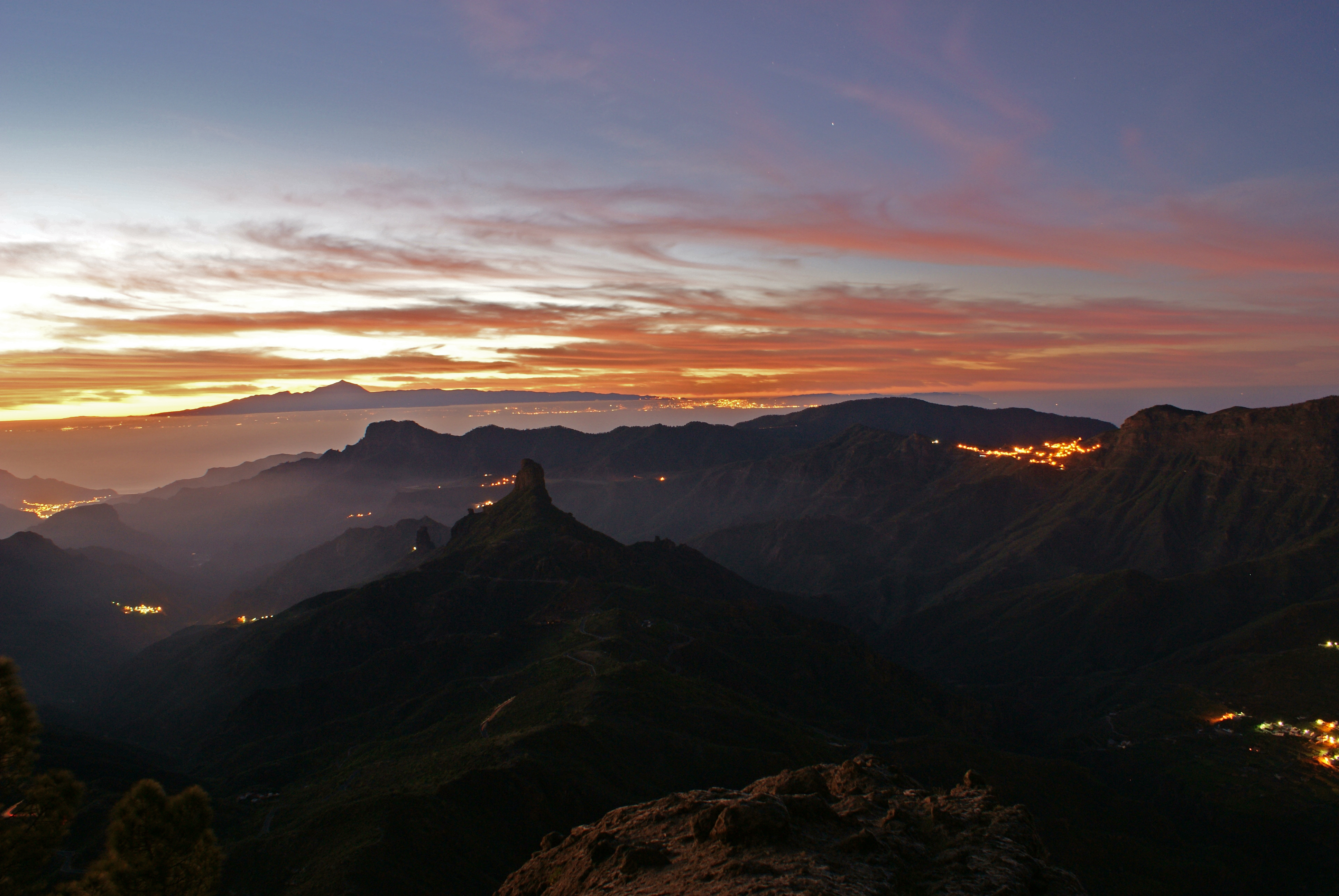 Foto del municipio de Tejeda, Gran Canaria, y de fondo El Teide, Tenerife. Islas Canarias, España